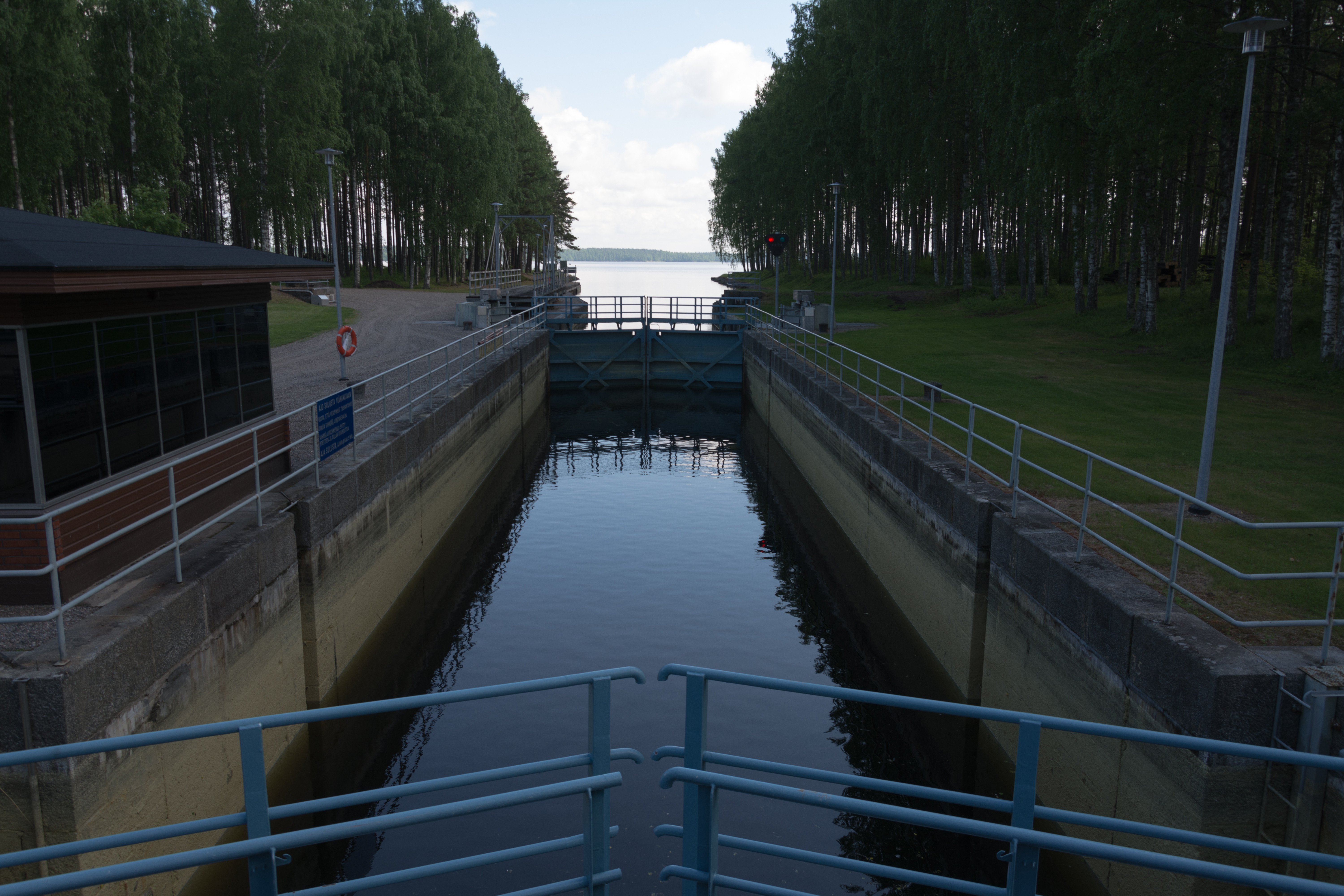 Kiesimän kanava Rautalammilla